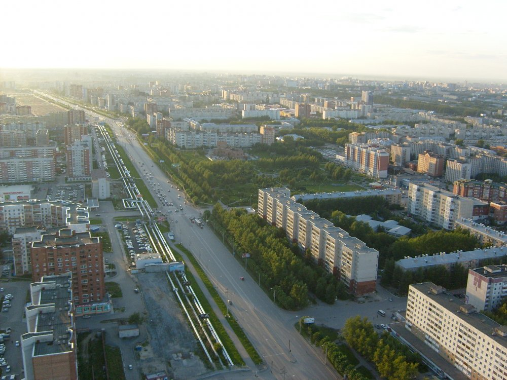 Улица Широтная в Тюмени (перекрёсток с улицей Олимпийской)